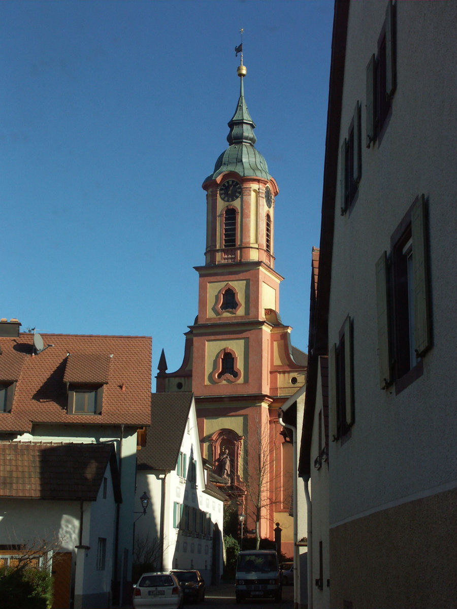 St. Remigius, Merdingen, Germany